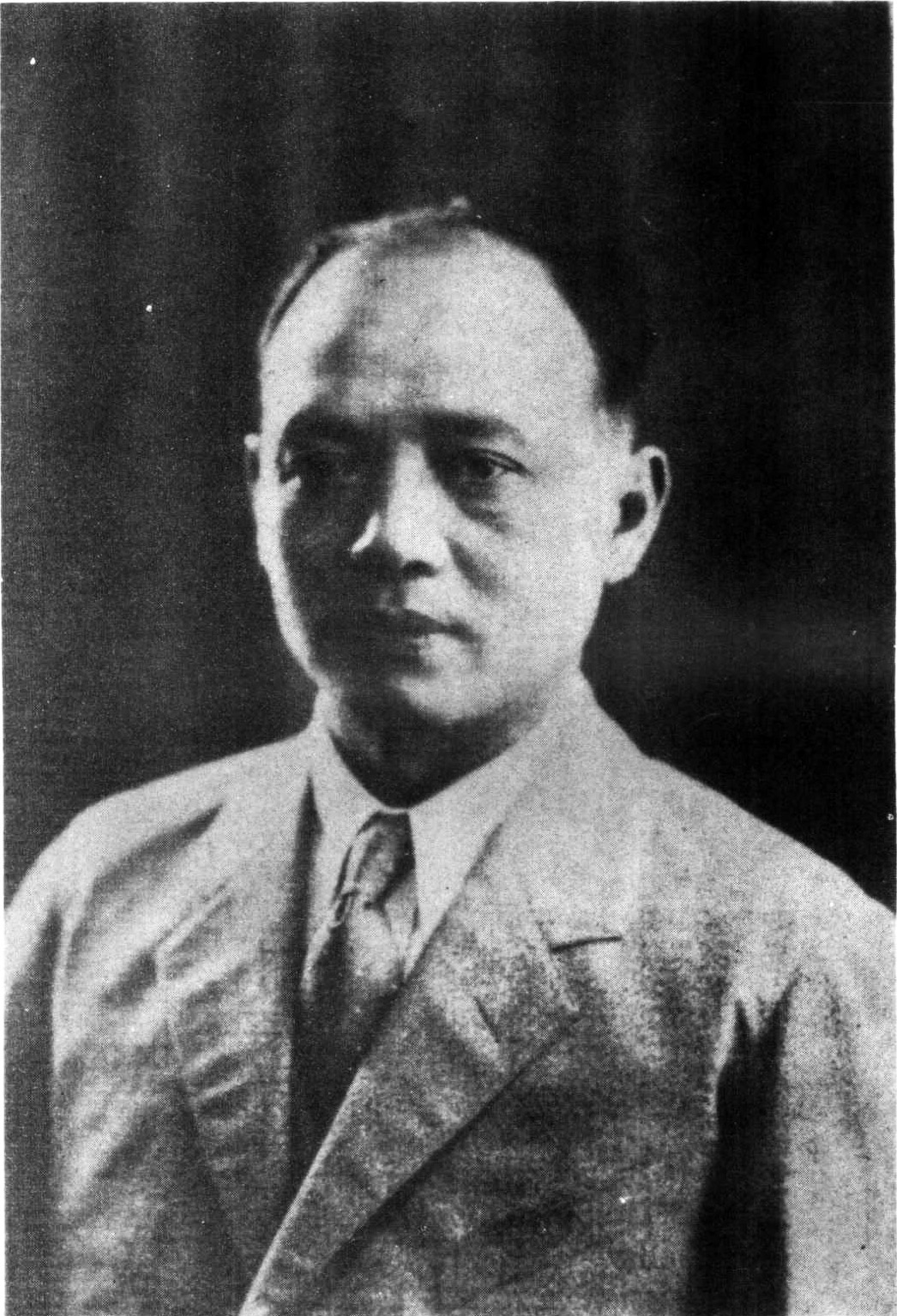 但懋辛（1886年－1965年）